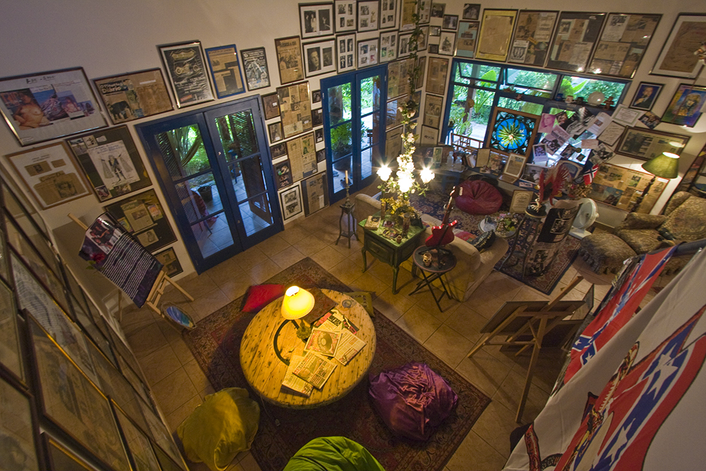 Av. Vilamar s/n - Itauna - Saquarema - Próximo ao DPO